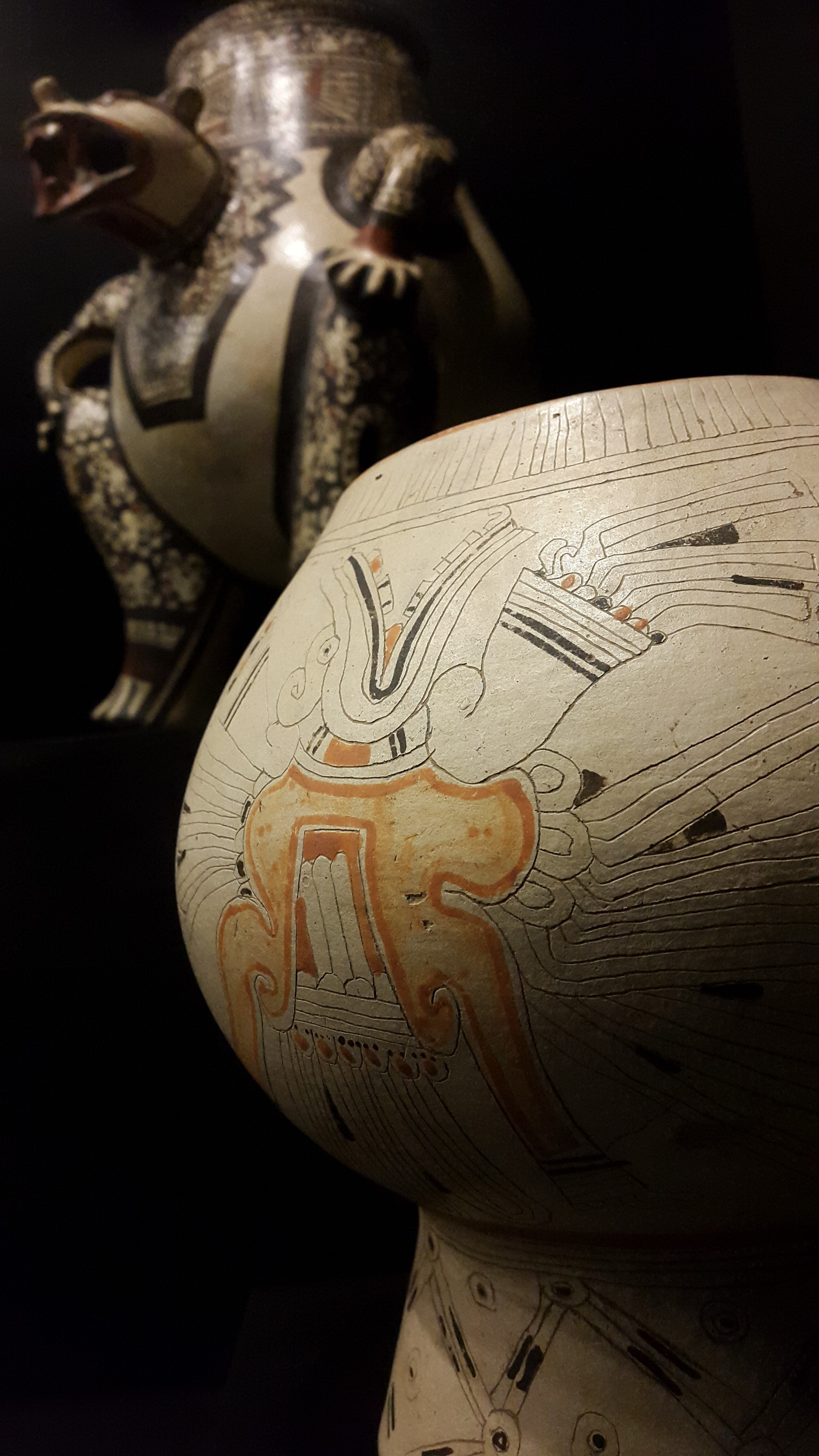 En primer plano, vasija policromada estilo Papagayo. En segundo plano, vasija trípode policromada estilo Pataky. Estos dos estilos fueron los más frecuentemente utilizados por la cultura de Nicoya a partir de 800 d.C, con el arribo de los chorotegas. En ambas se distinguen decorados mesoamericanos.